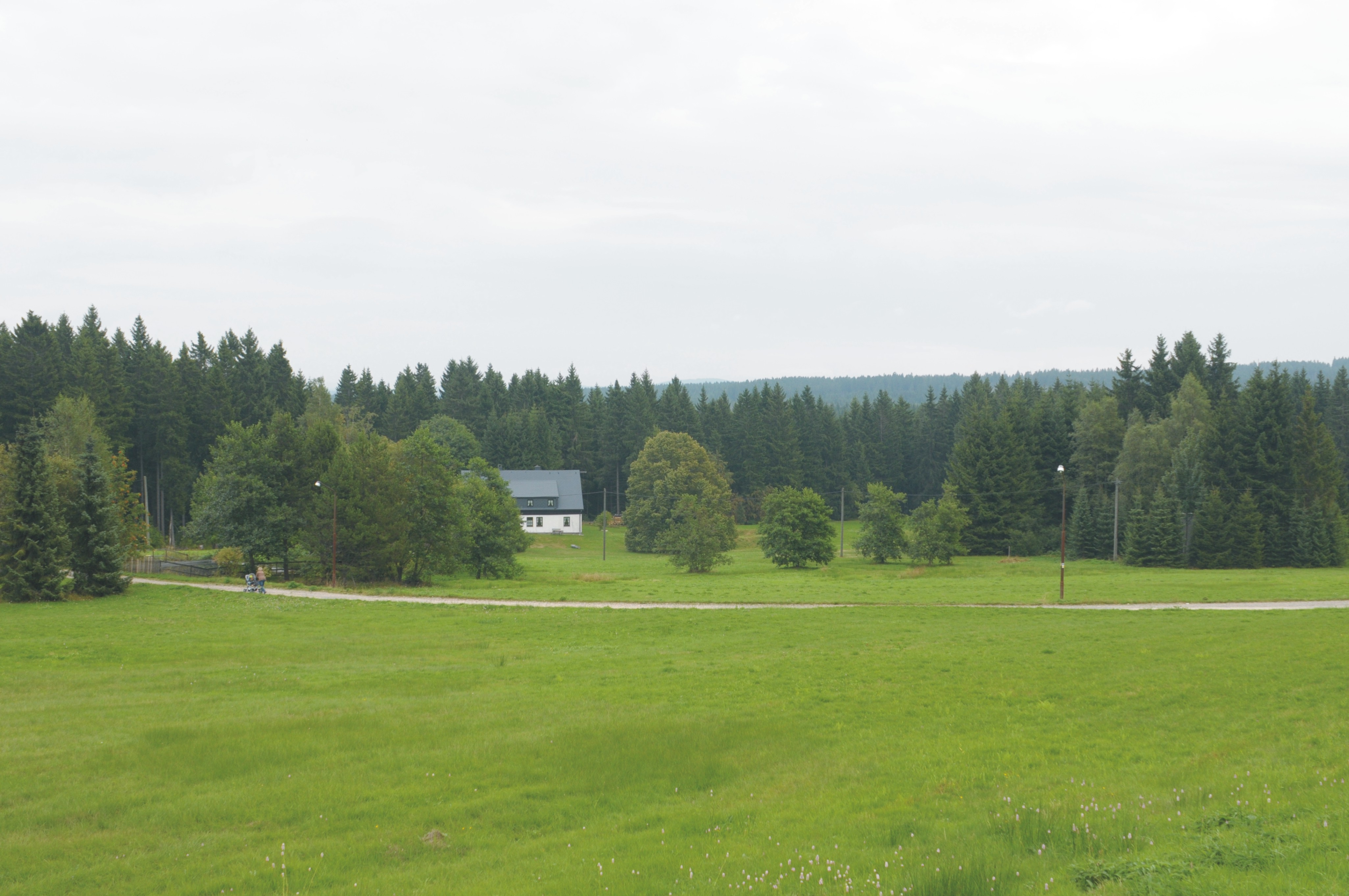 Sauschwemme, am Südabhang des Auersberges (Gemeinde Johanngeorgenstadt, Sachsen, Deutschland)